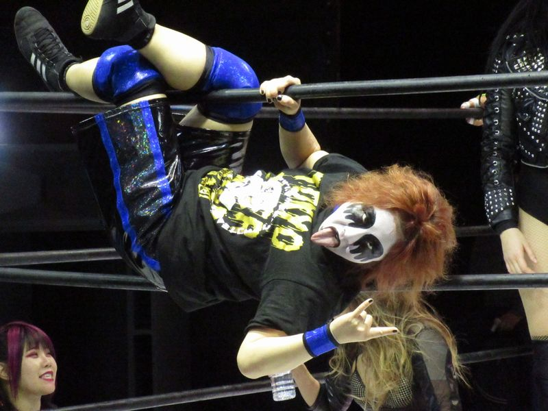 2019年大阪大会にて